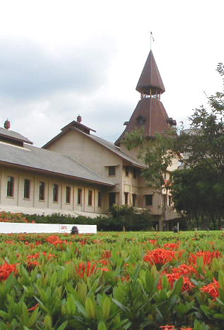 ภาพ โดมธรรมศาสตร์ ถ่ายเมื่อปี พ.ศ. 2543 โดย User:Manop